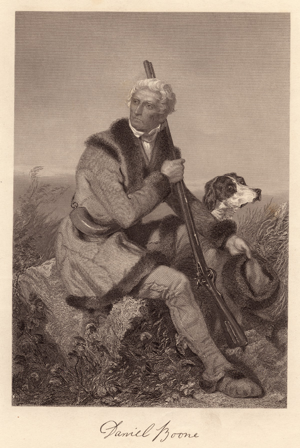 Daniel Boone, Frontispiz-Illustration eines zeitgenössischen Buches